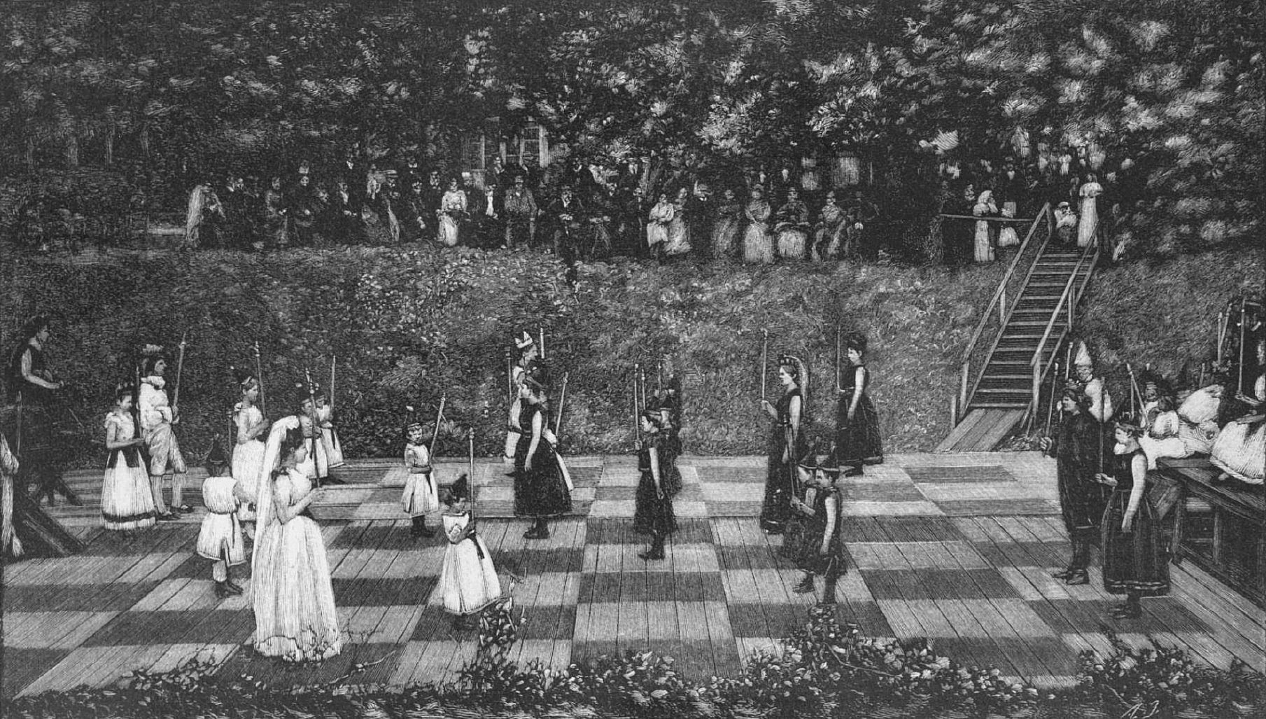 Живая шахматная партия. Празднества по случаю столетия фабрики «Катарина Лизетт» в Лифляндии, принадлежащей известному шахматисту Фридриху Амелунгу (1892 г.).